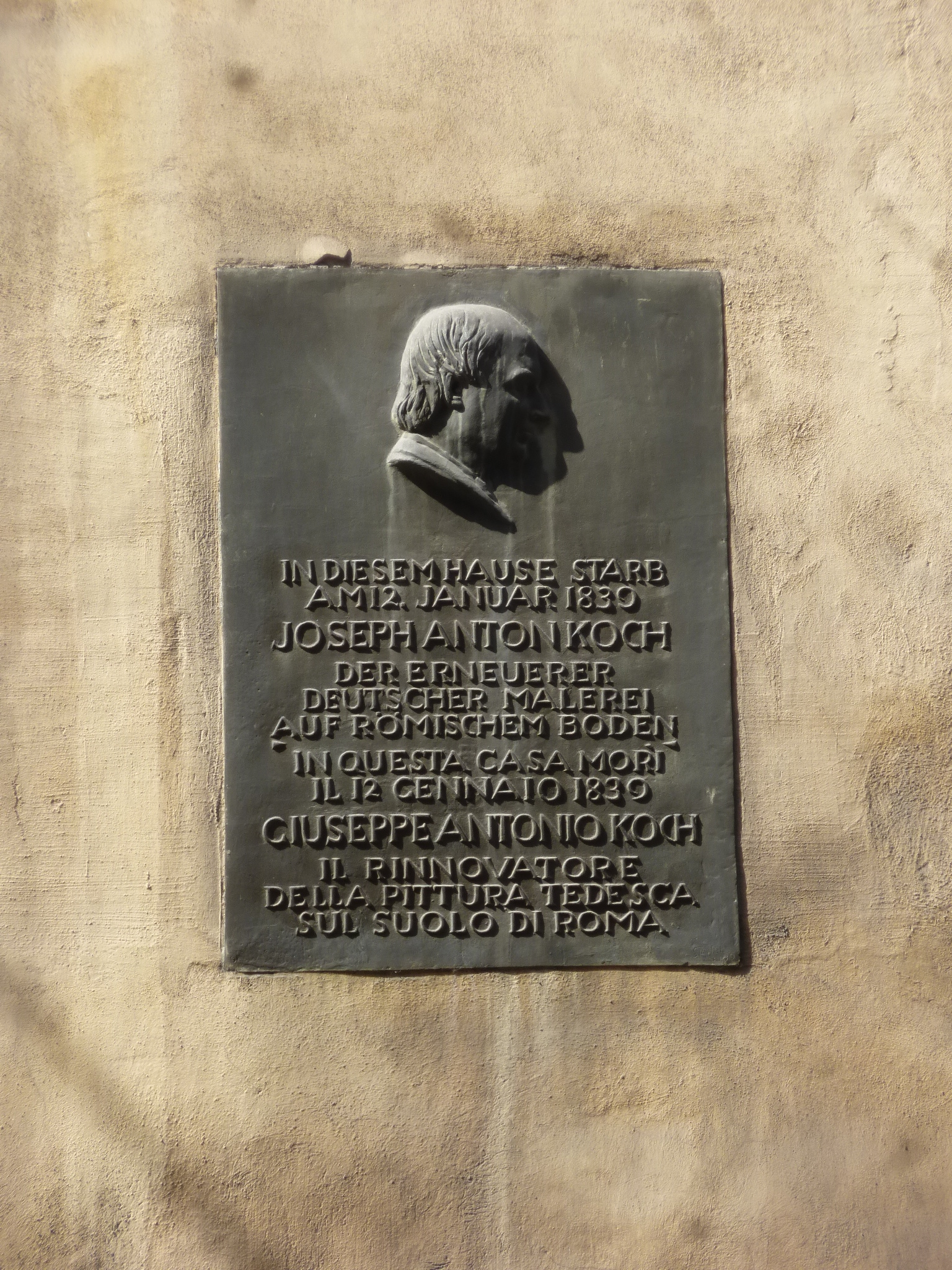 Roma, via delle Quattro Fontane. Memoria di Joseph Anton Koch sul fianco di palazzo Galoppi.